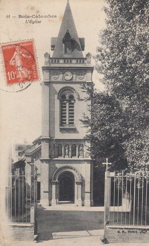 Eglise de Bois-Colombes